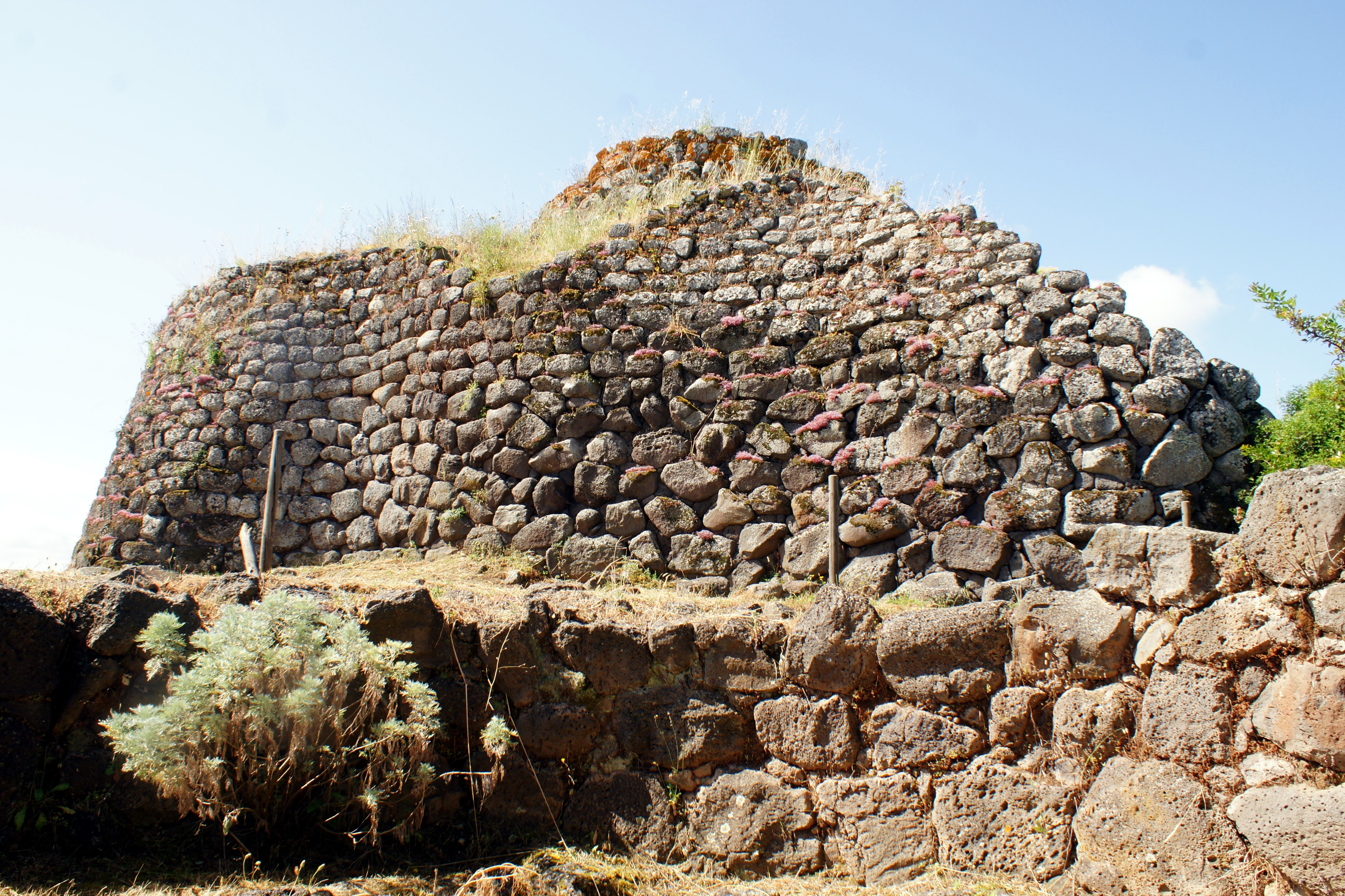 Nuraghe e tomba di gigante n.2 di Iloi - MIBAC This is a photo of a monument which is part of cultural heritage of Italy.